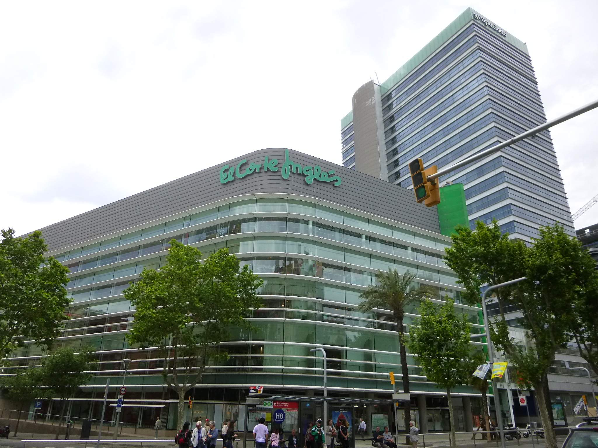 Barcelona - El Corte Inglés (Diagonal, 471)